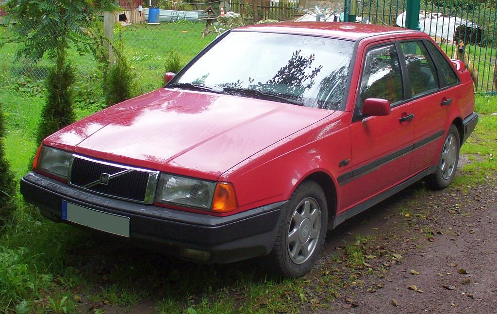 Volvo 440